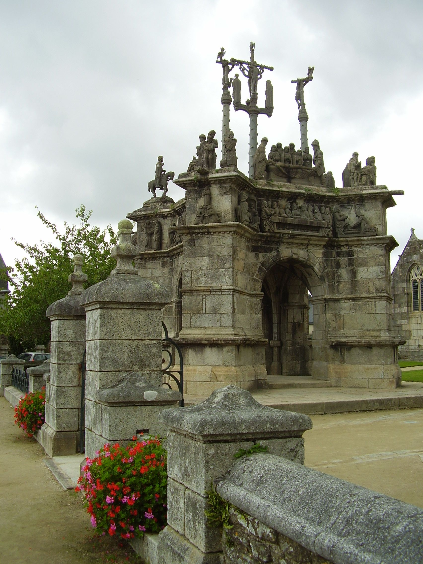 Pleyben, Pfarrbezirk mit monumentaler Calvaire und Kirche, Frankreich; Calvaire